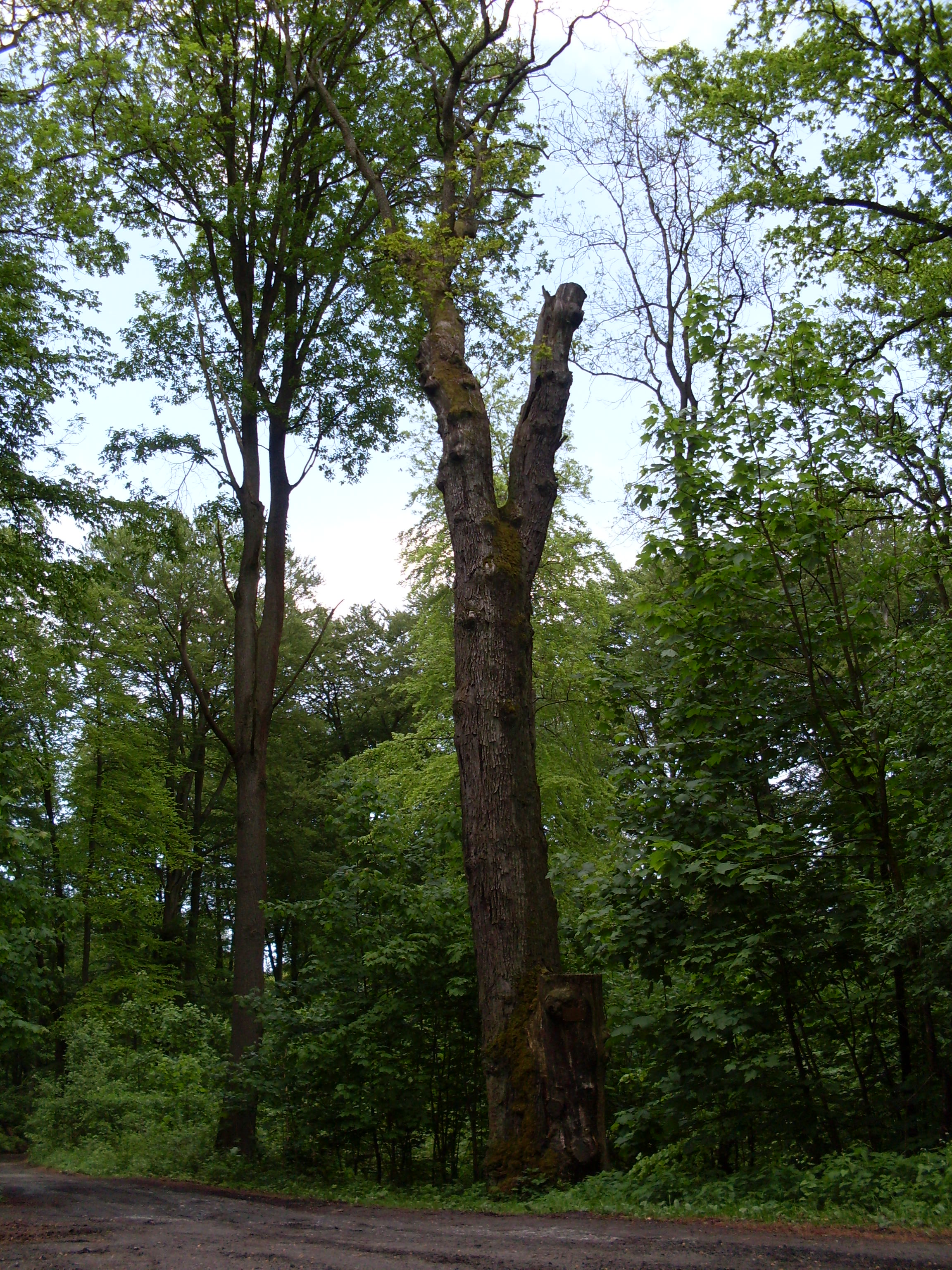 Dąb Bogusława w Puszczy Wkrzańskiej, okolice Leśna Górnego